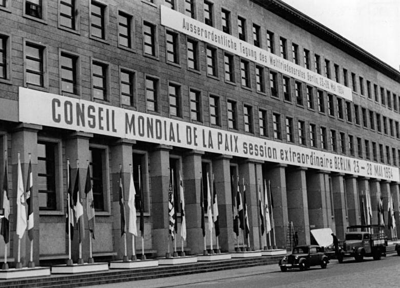 Berlin, Finanzministerium, geschmückt Zentralbild Junge 2 Motive 24.5.1954 Tagungsort der Weltfriedensratstagung Am 24.5.1954 beginnt im Ministerium für Finanzen in Berlin die außerordentliche Tagung des Weltfriedensrates. UBz: das Ministerium für Finanzen wurde zum Empfang der Mitglieder des Weltfriedensrates und der Gäste festlich geschmückt